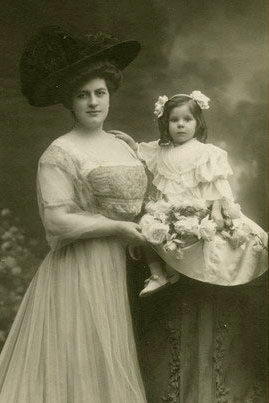 Antonio Cánovas del Castillo y Vallejo (Kaulak), Retrato de Julia Schmidtlein y García-Teruel con su hija Carolina de Bermejillo, Madrid, 1908.